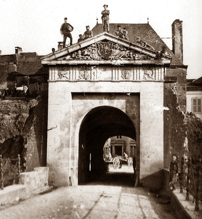 La façade extérieure de la Porte-Neuve